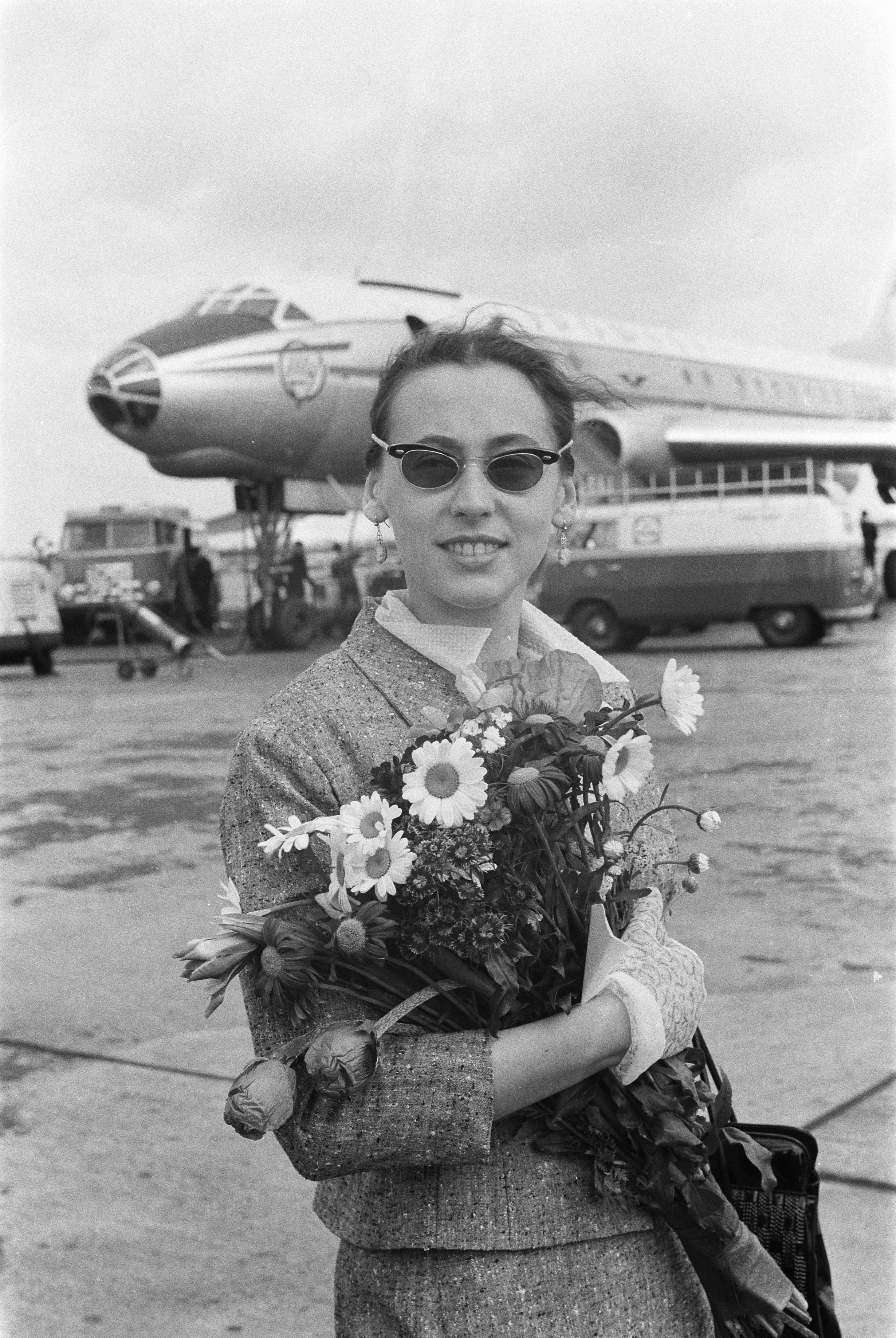 Collectie / Archief : Fotocollectie Anefo Reportage / Serie : [ onbekend ] Beschrijving : Aankomst solisten van het Bolshoiballet op Schiphol, jong danseres Nina Timofeeva Datum : 9 juni 1960 Locatie : Noord-Holland, Schiphol Trefwoorden : aankomsten, danseressen, solisten Persoonsnaam : Bolshoiballet, Nina Timofeeva Fotograaf : Pot, Harry / Anefo Auteursrechthebbende : Nationaal Archief Materiaalsoort : Negatief (zwart/wit) Nummer archiefinventaris : bekijk toegang 2.24.01.05 Bestanddeelnummer : 911-3241